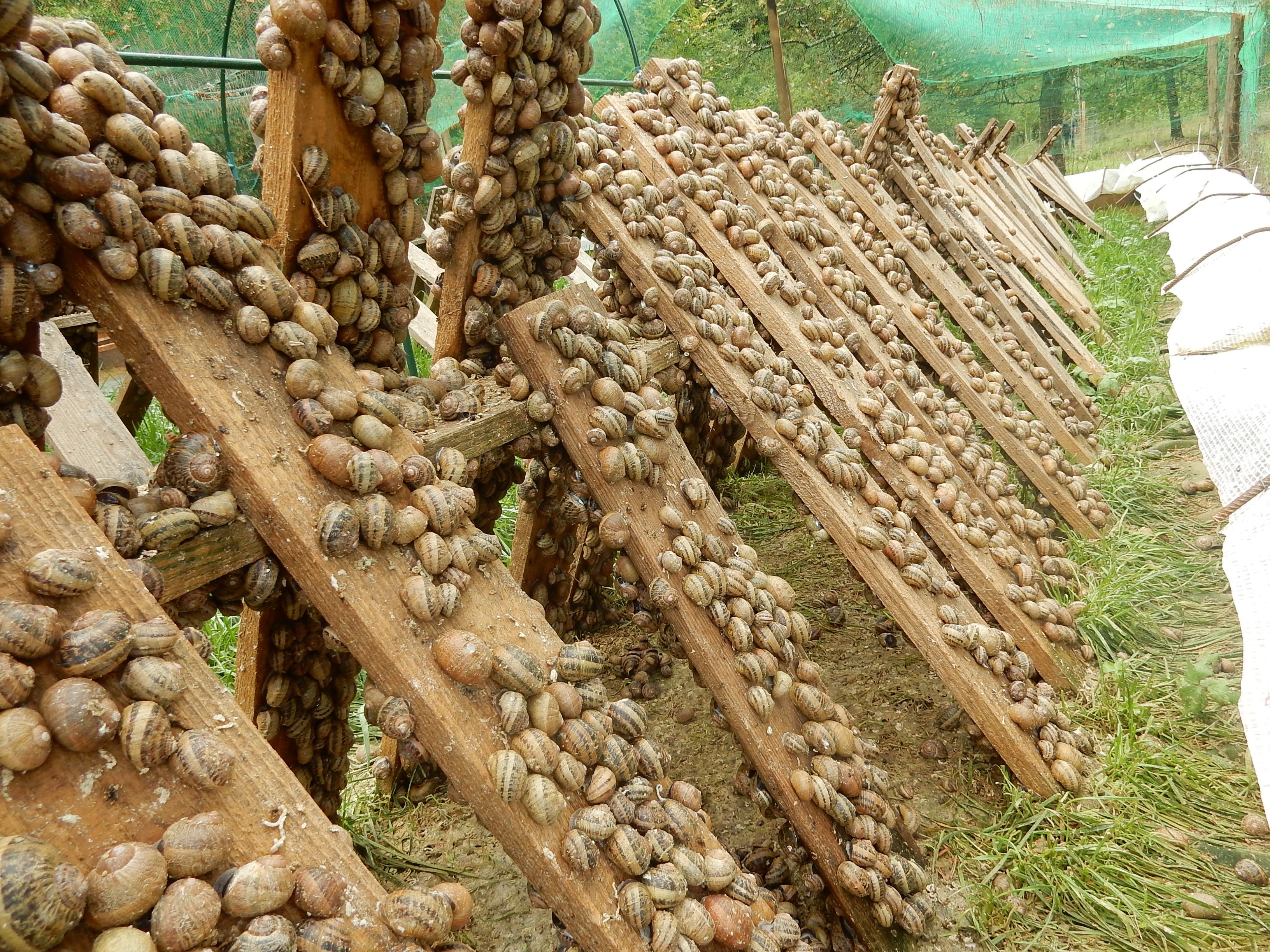 Planches placées typiquement pour héberger les escargots dans le cadre d'un élevage